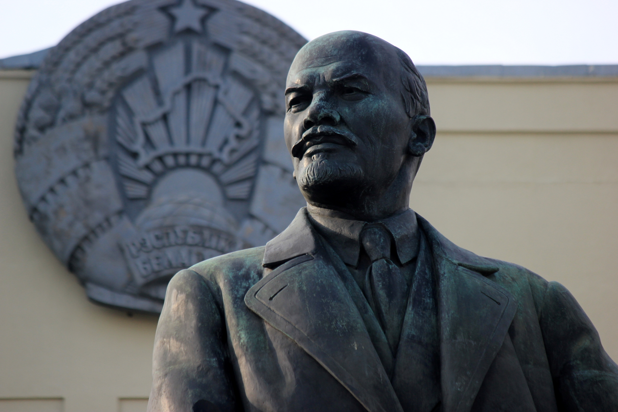 Minsk; Leninstatue vor dem Repräsentantenhaus auf dem Unabhängigkeitsplatz.